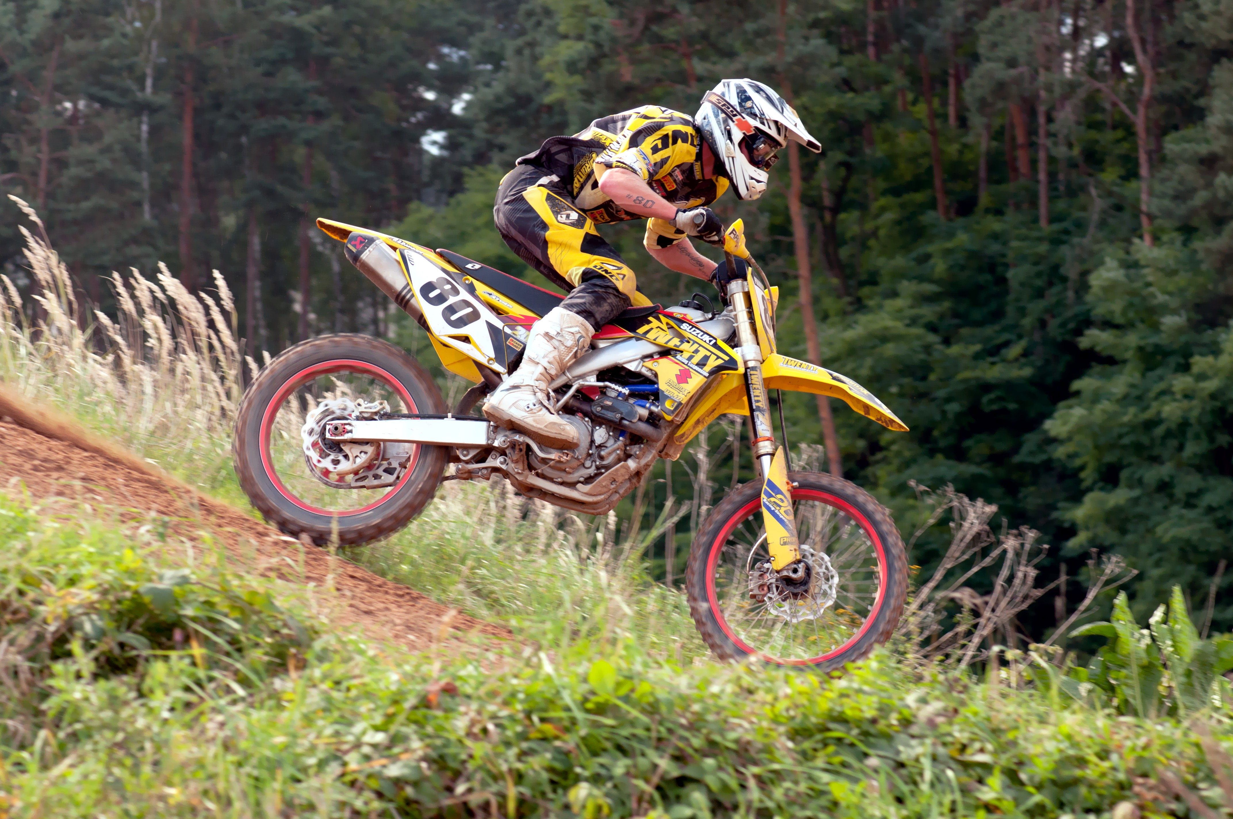 Motocross Pößneck 2010